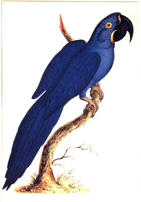 Hyacinth Macaw Anodorhynchus hyacinthinus